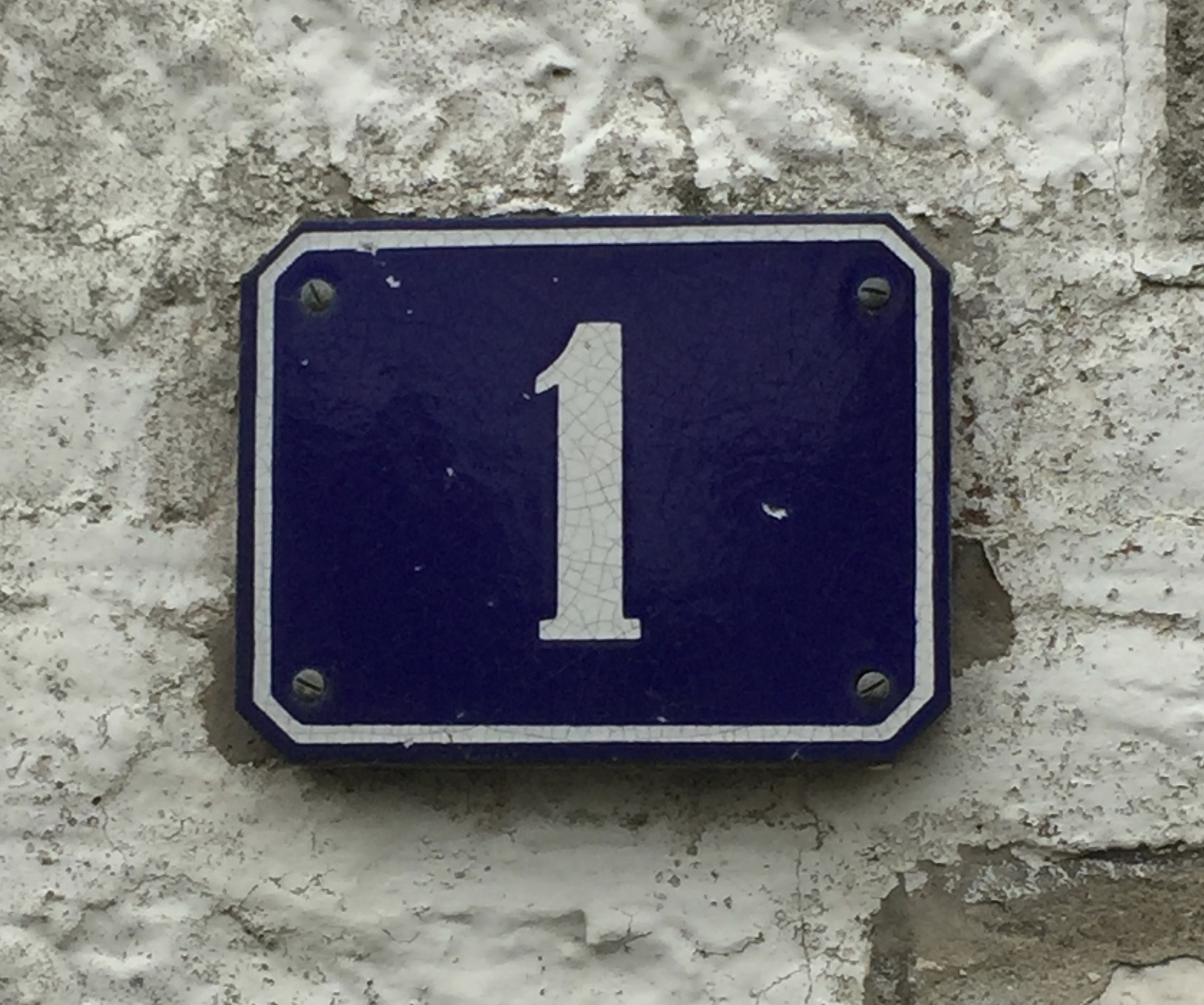 Plaque de numérotation de couleur bleue, à l'ouest du boulevard Daloz, au Touquet-Paris-Plage.